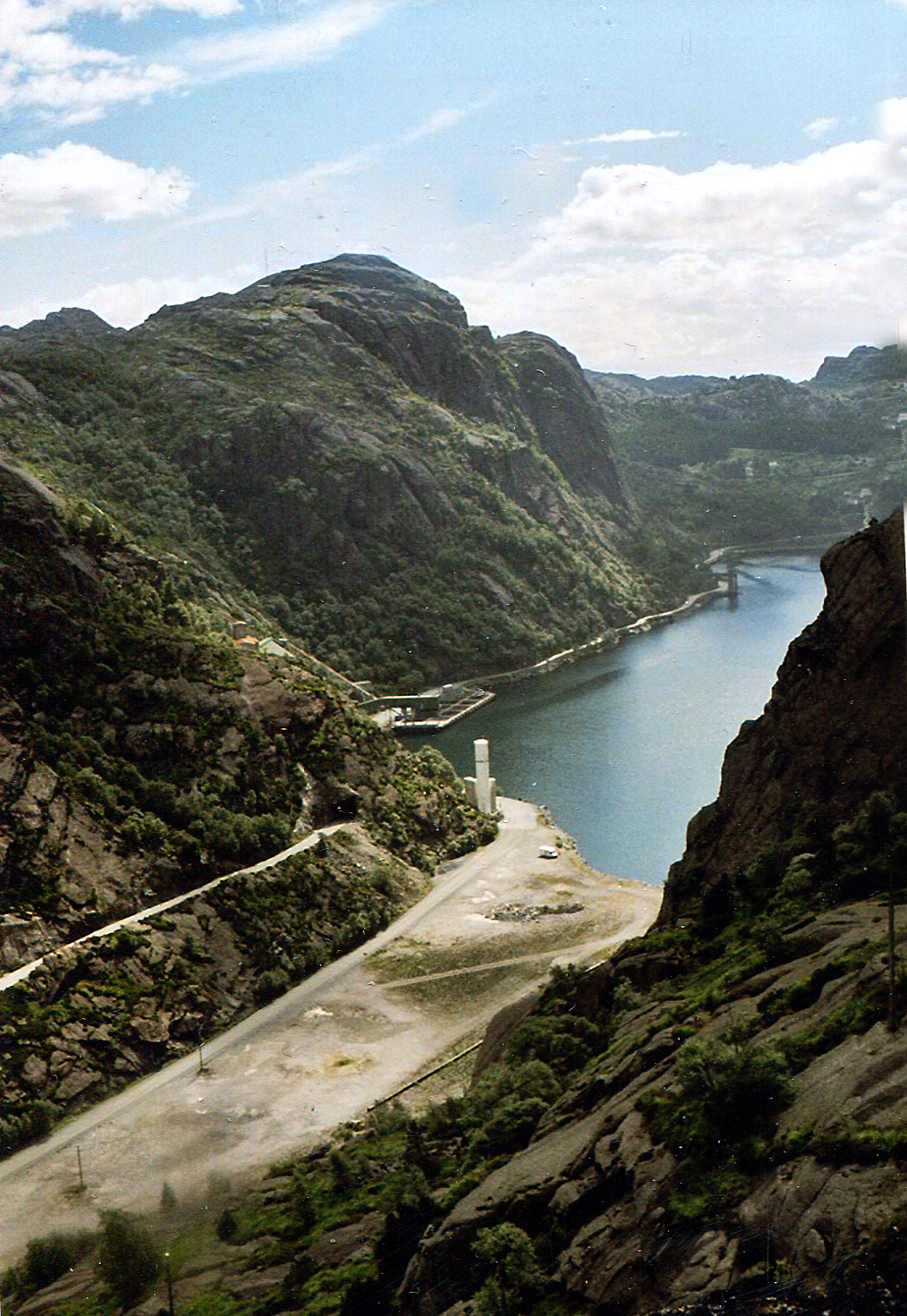 Йосингфиорд.Норвегия